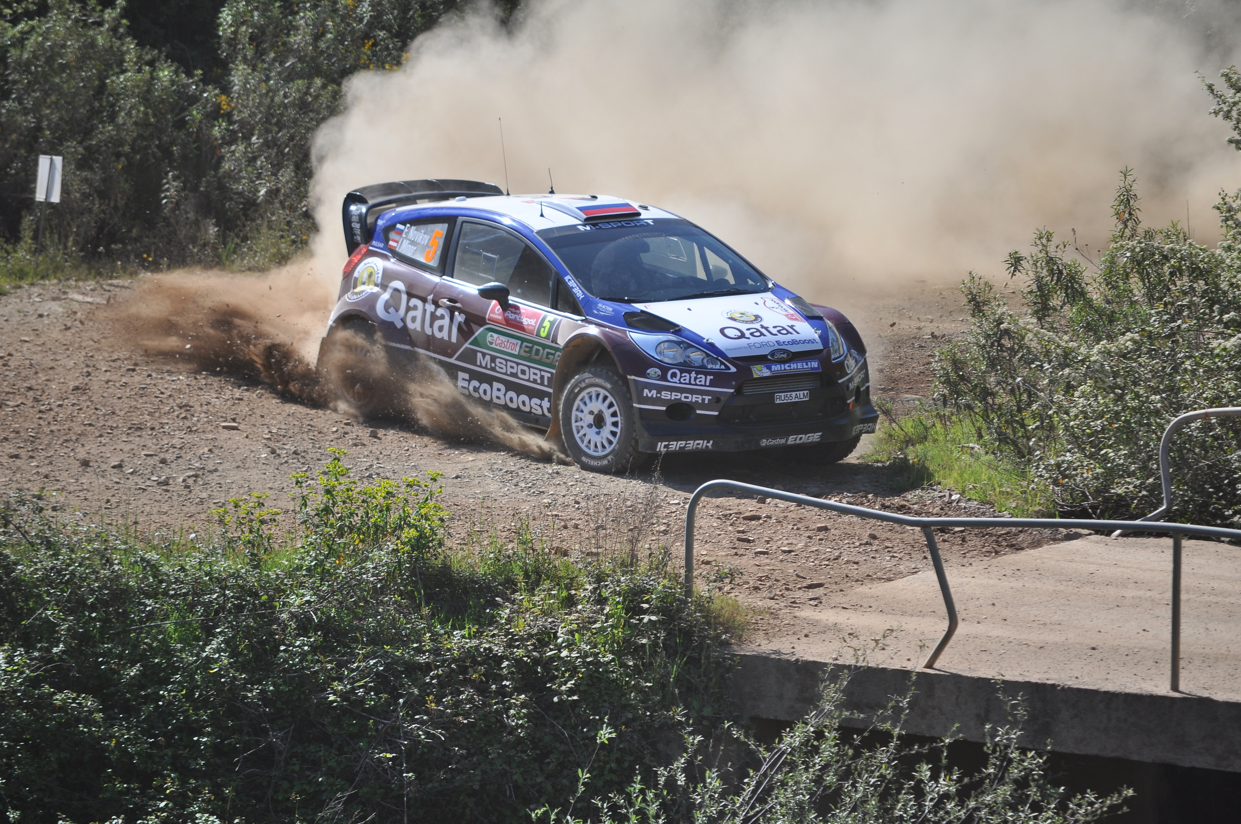 Novikov 2013 Portugal